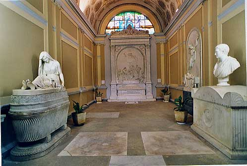 Canino (VT) - Cappella Bonaparte, all'interno della collegiata di Canino (prov. di Viterbo). I monumenti funebri di Cristina Boyer (prima moglie) e di Carlo (padre) di Luciano Bonaparte, sono di Francesco Massimiliano Laboureur. Foto di Giacomo Mazzuoli. L'autore mi ha dato di persona il consenso per l'uso su Wikipedia. --M/ 16:49, Lug 21, 2004 (UTC)